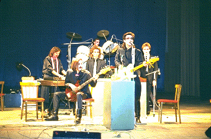 Концерт Группы Наутилус Концерт в конце 80-х